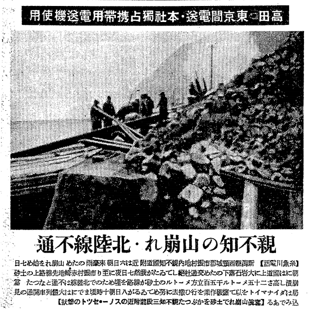 1936年（昭和11年）11月7日に起った親不知附近において起った落石により北陸線が不通となっている旨を報ずる記事